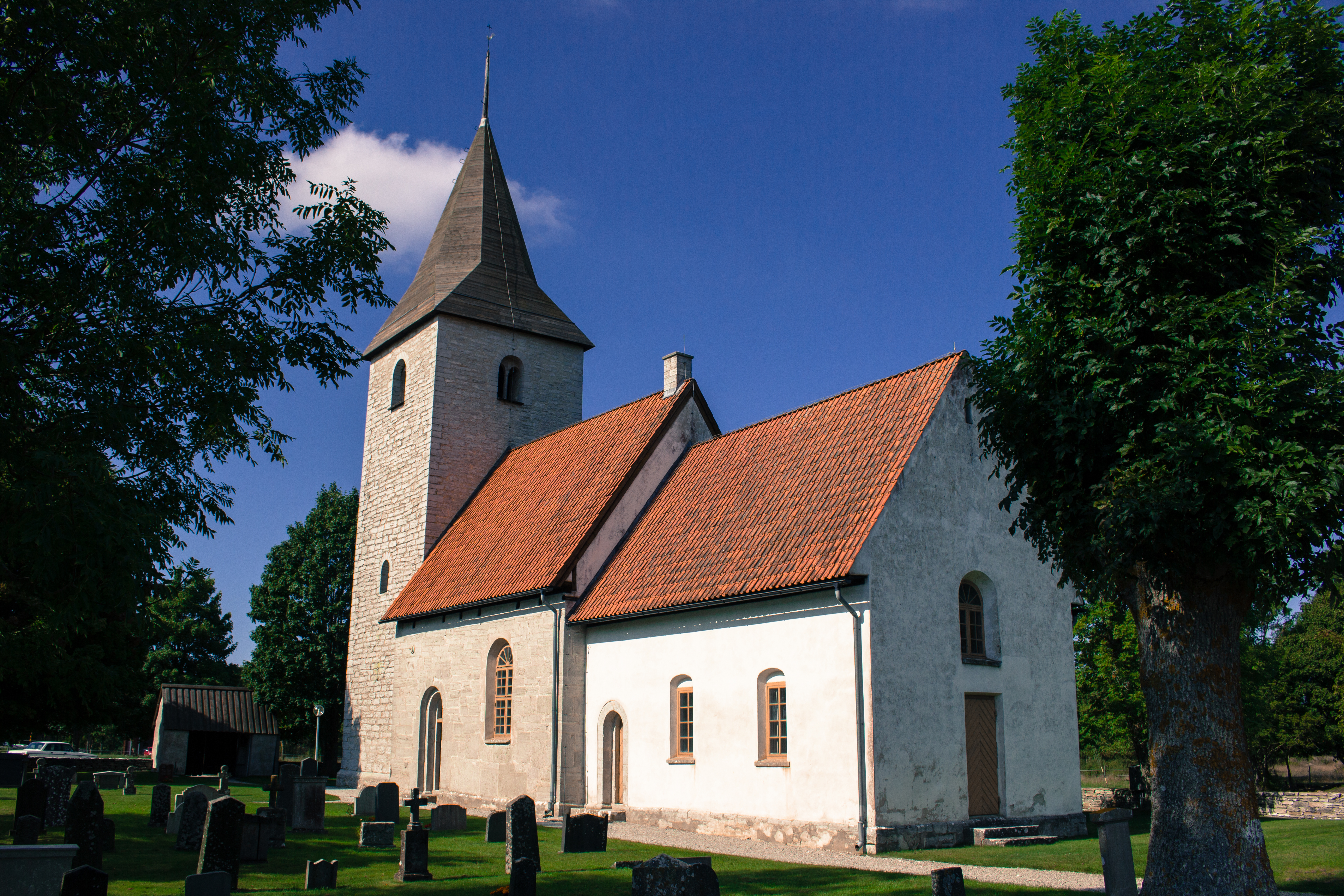 Igrexa de Viklau, na illa sueca de Gotland.